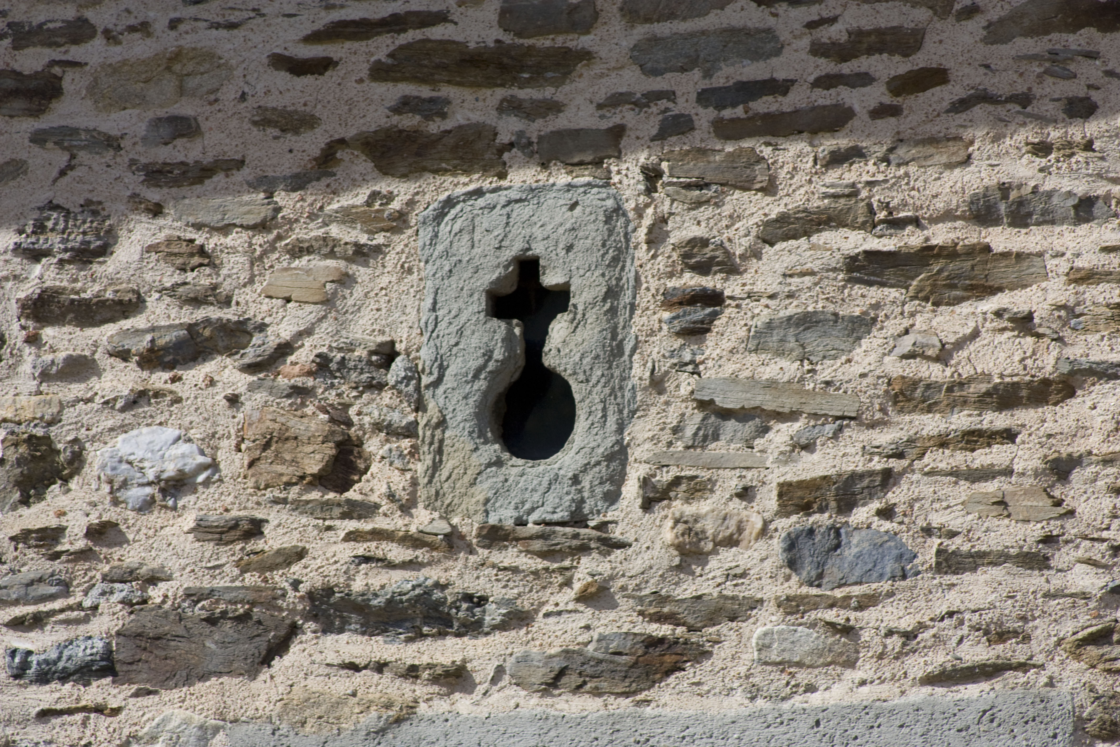 La façade du prieuré était autrefois son mur d'enceinte. Les portes et fenêtres ont été percées lorsqu'il fut vendu comme bien national. Il subsiste, en partie haute, des meurtrières, régulièrement espacées, des meurtrières dont la forme rappelle les armoiries de l'ordre : un globe surmonté d'une croix.